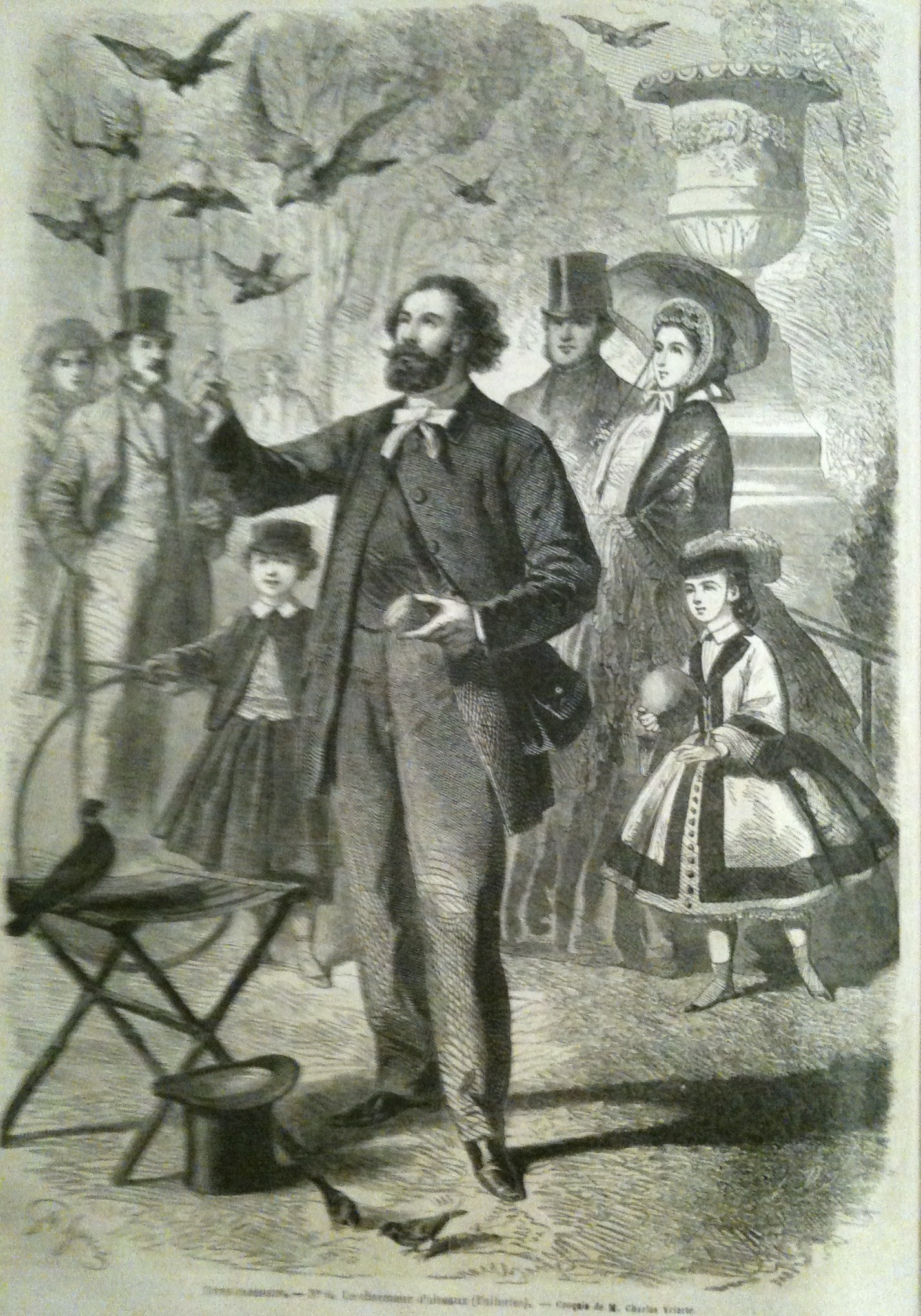 Le charmeur d'oiseaux des Tuileries (Q11318345)